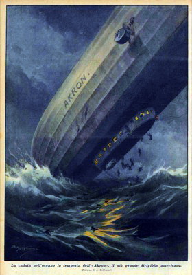 La caduta del dirigibile Akron illustrata sulla copertina della Domenica del Corriere